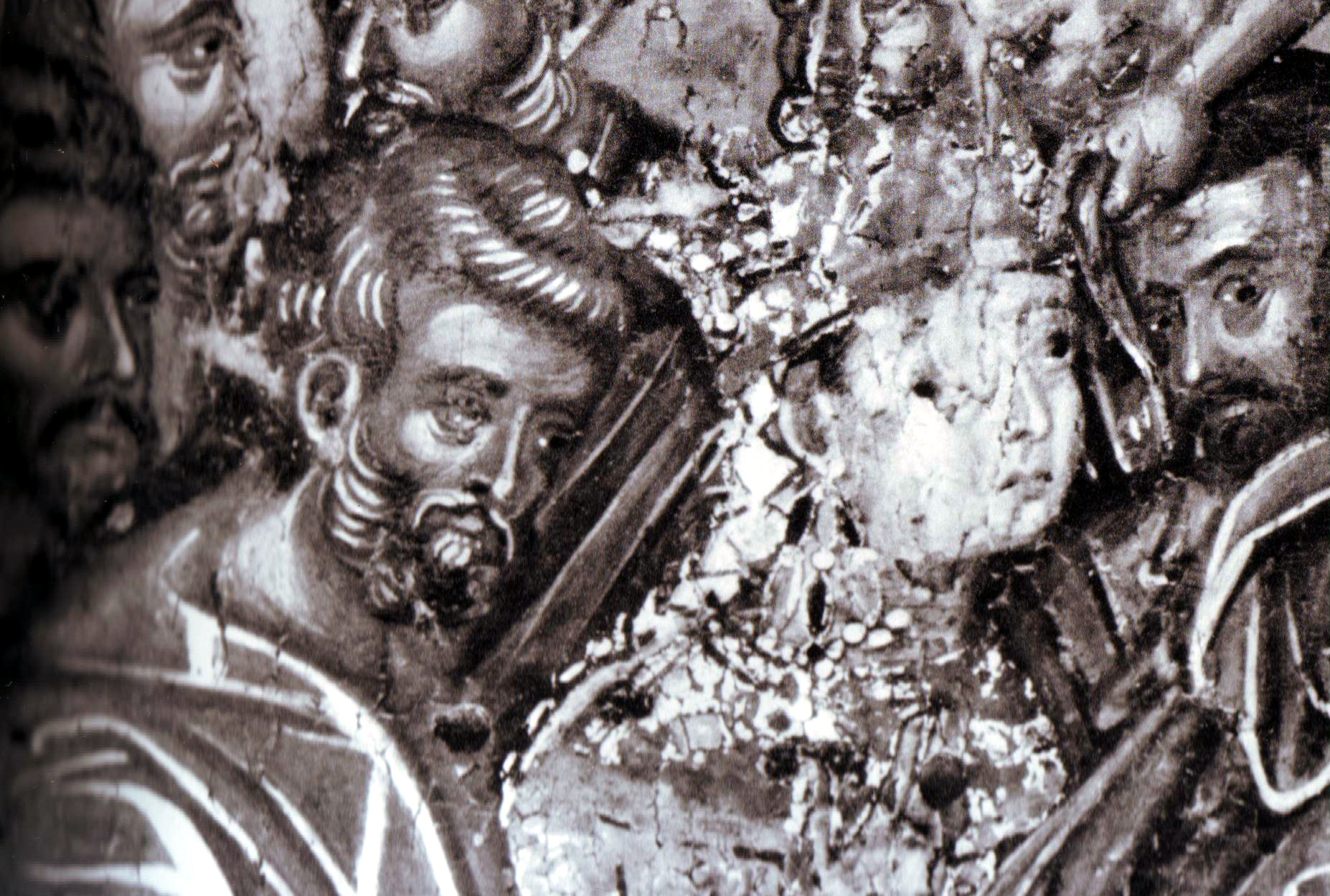 Княгиня Мария Палеолог и её супруг Фома Прелюбович. Монастырь Преображения, Метеоры. Деталь иконы "Уверение Фомы". Princess Maria Paelolog and her husband Thomas Prelubovich. Detail of icon "Doubting Saint Thomas". Monastery of Transfiguration, Metheora